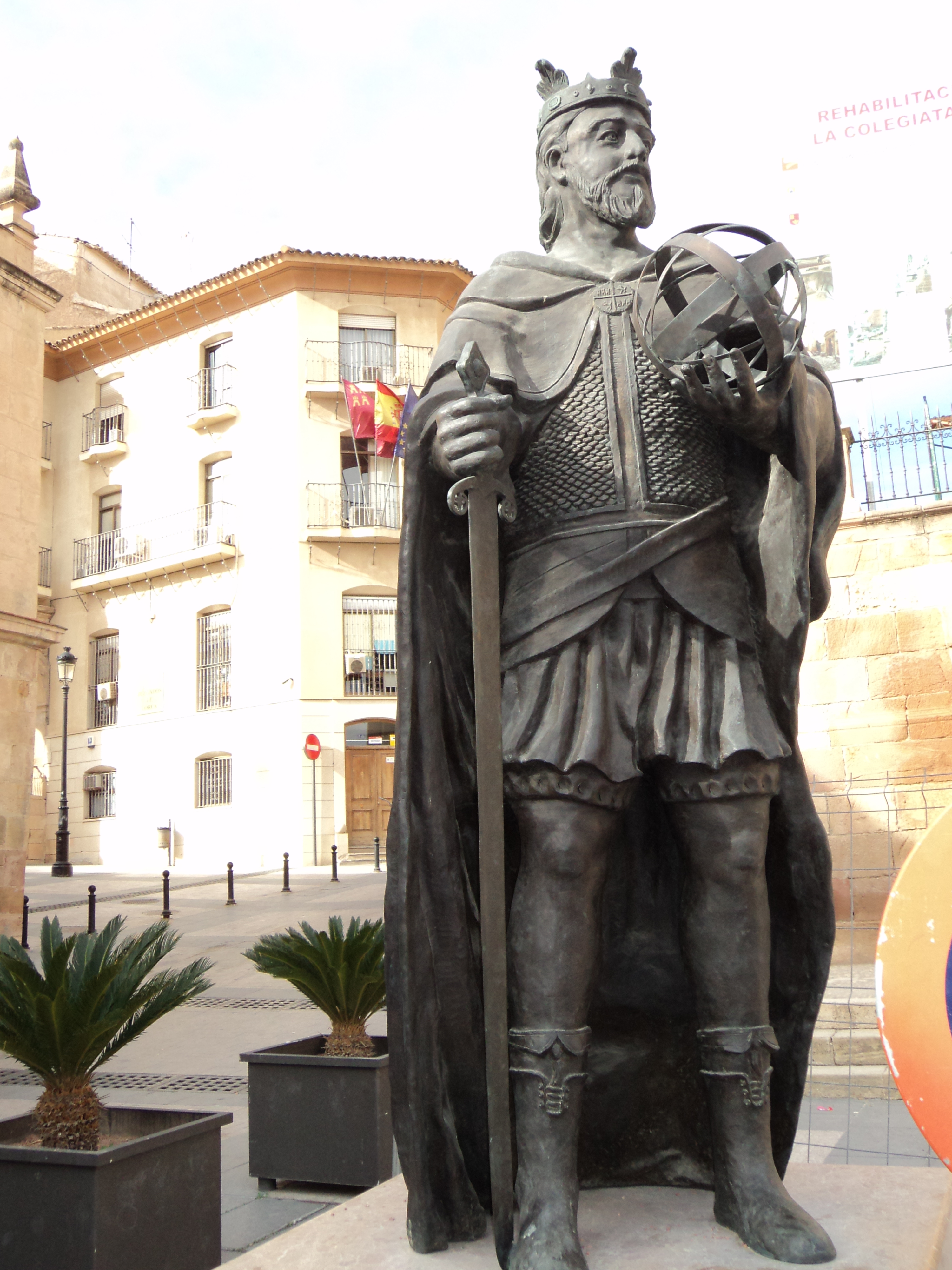 Estátua medindo 1,95 metros de altura em bronze representando o Rei Afonso X "O Sábio". Está instalada na Praça de Espanha em Lorca. Na escultura o monarca é representado aos quarenta anos de idade vestindo uma capa, uma cota de malha e porta um astrolábio na mão esquerda e uma espada cerimonial na mão direita.